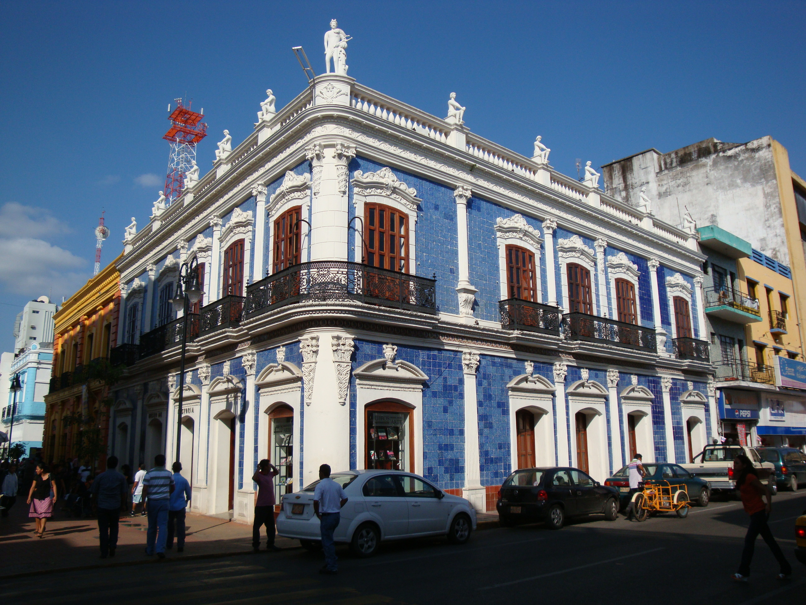 "Casa de los Azulejos", construída en 1889, En el Centro Histórico de la Ciudad de Villahermosa, Tabasco, México. Su construcción es de estilo ecléctico, ya que tiene mosaicos catalanes en pisos y paredes, arcos polilobulados y de medio punto, puertas y ventanas labradas de madera y también una hermosa herrería caligrafiada en sus balcones. En la parte superior del edificio resaltan las esculturas dispuestas a manera de remate, como la de la esquina que representa al dios romano del comercio, Mercurio, y otras diez esculturas humanas sobre la balaustrada, es notable también el friso que corre en el entrepiso, el cual muestra azulejos con un rostro femenino de perfil, personificando a la célebre reina egipcia Cleopatra. En su interior el inmueble conserva un patio en el que se conjugan detalles arquitectónicos de marcada influencia gótica y morisca, aspecto que define al estilo general del edificio como ecléctico. El diseño del del edificio estuvo a cargo del tenedor de obra Jacinto Cabrales y al paso de los años funcionó como casa-habitación, comercio, edificio de gobierno, hotel y casa de huéspedes. Hoy alberga al Museo de Historia de Tabasco.